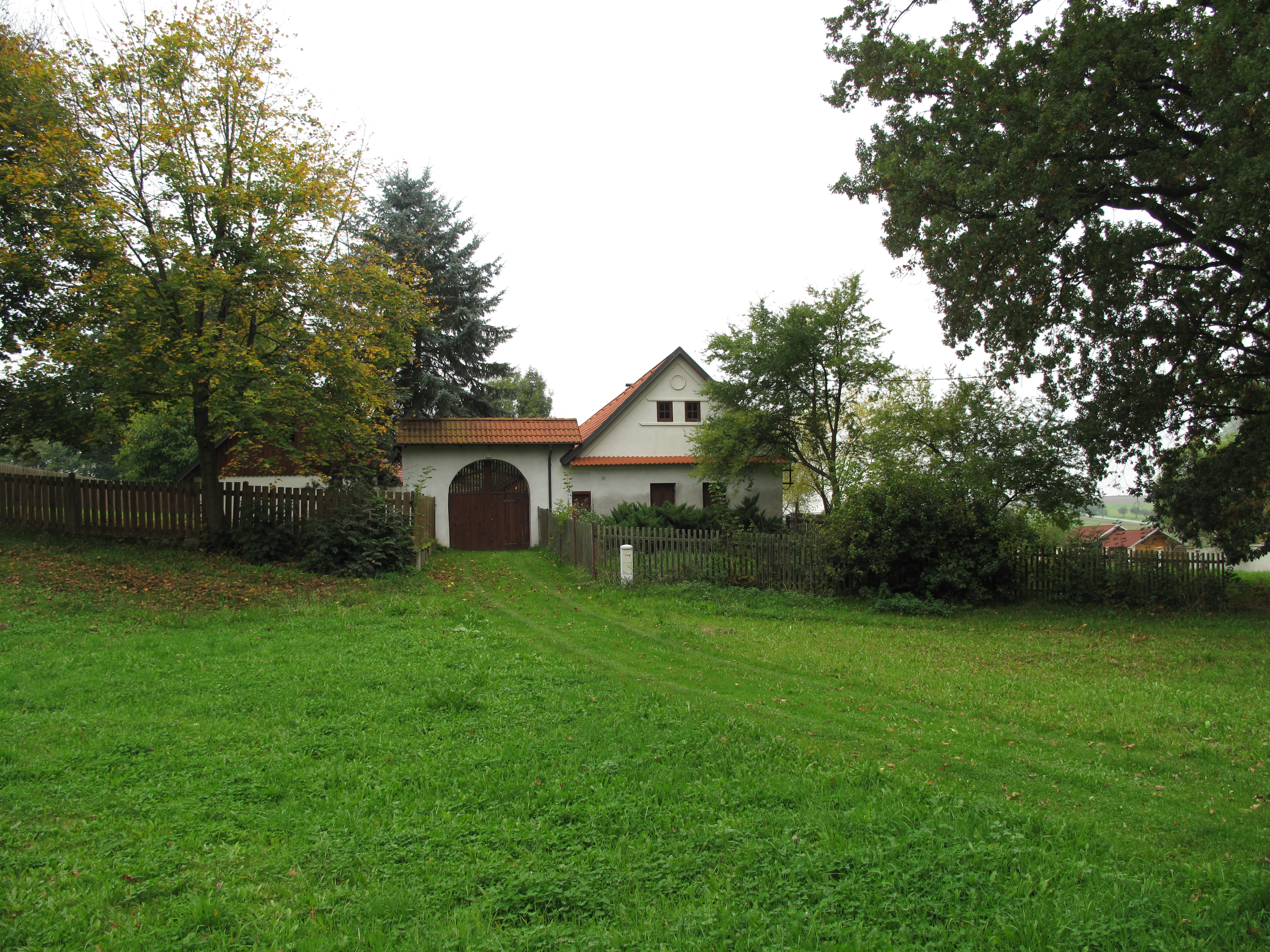 Trávník ve Slapsku. Okres Tábor, Česká republika.